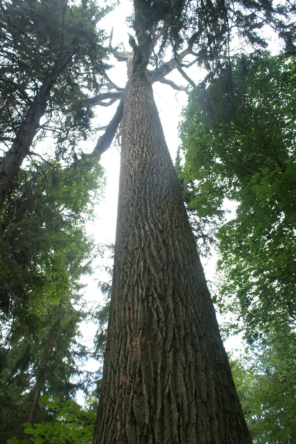 Dąb Król Nieznanowa - kolumna pnia (2009r.)